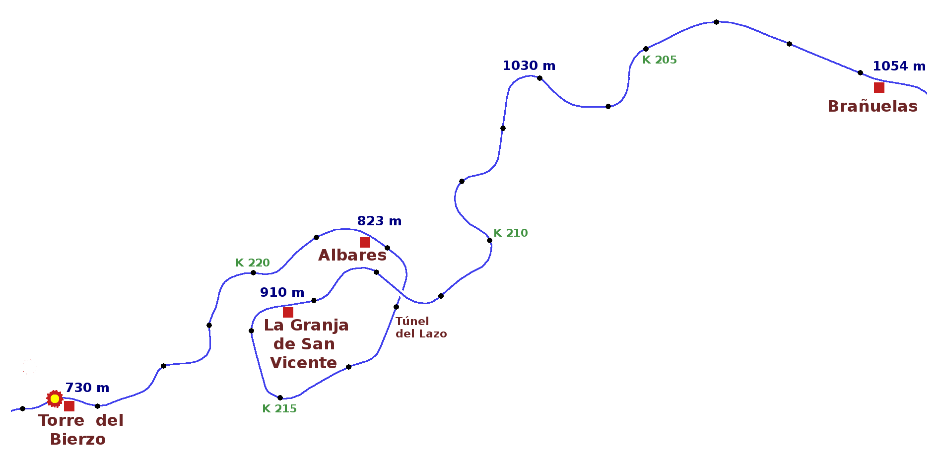 Accident de tren a la Torre del Bierzo